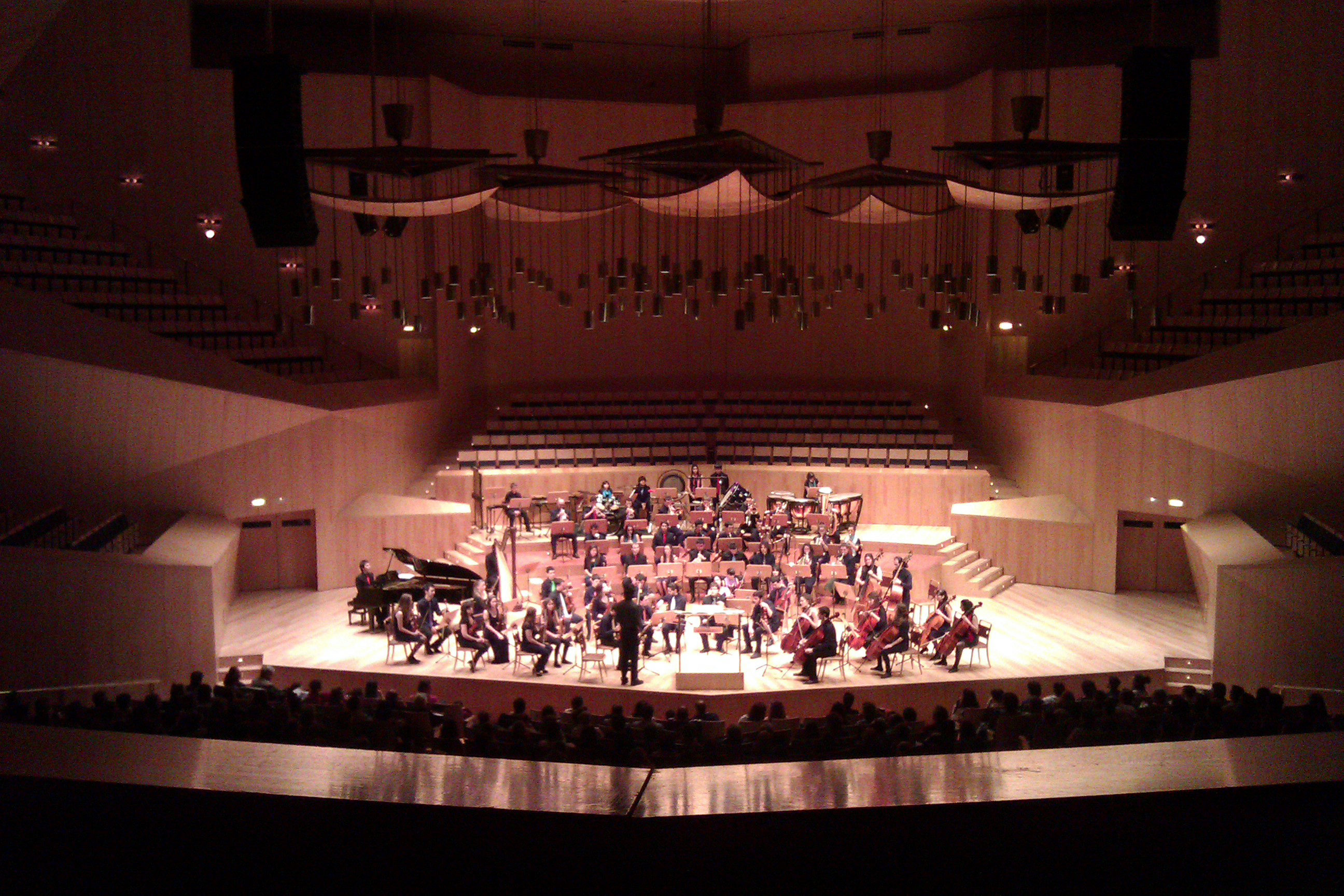 Aragonés: Sala Mozart Zaragoza